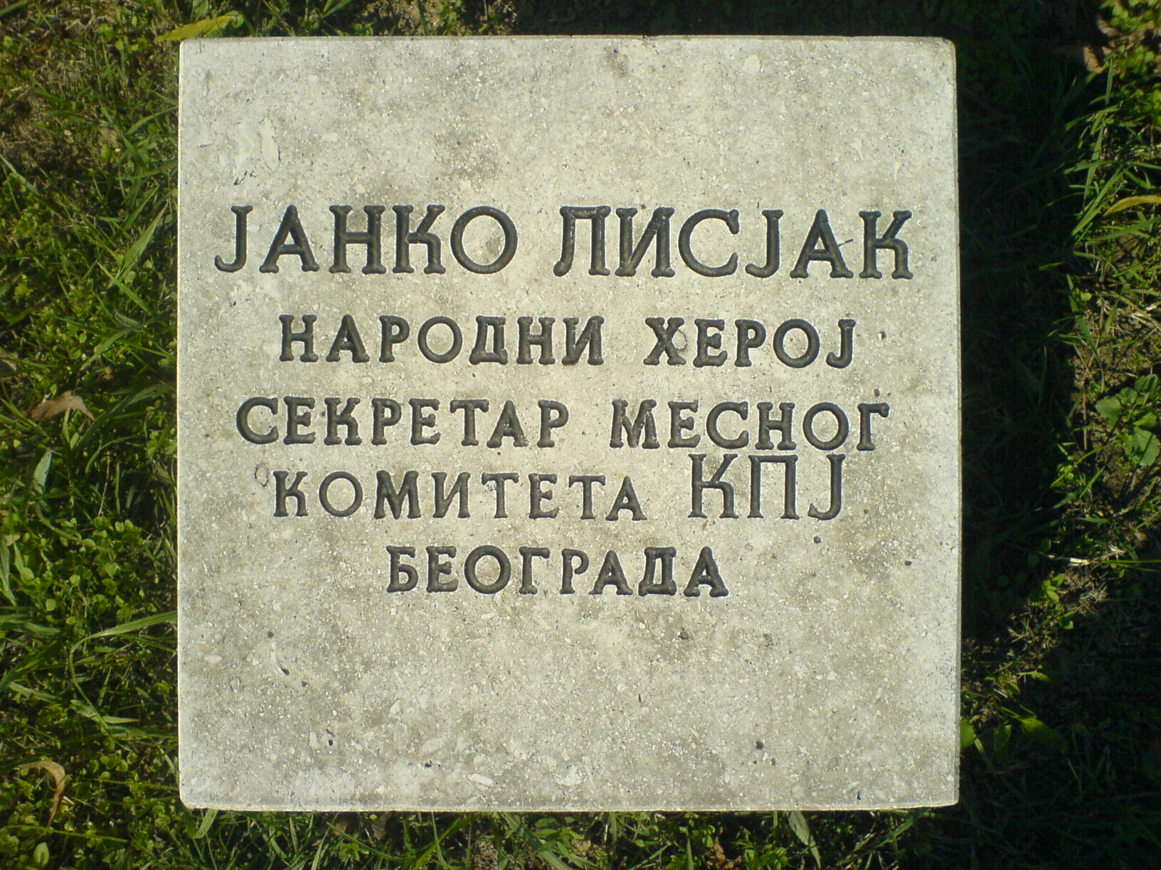 Grob Janka Lisjaka.